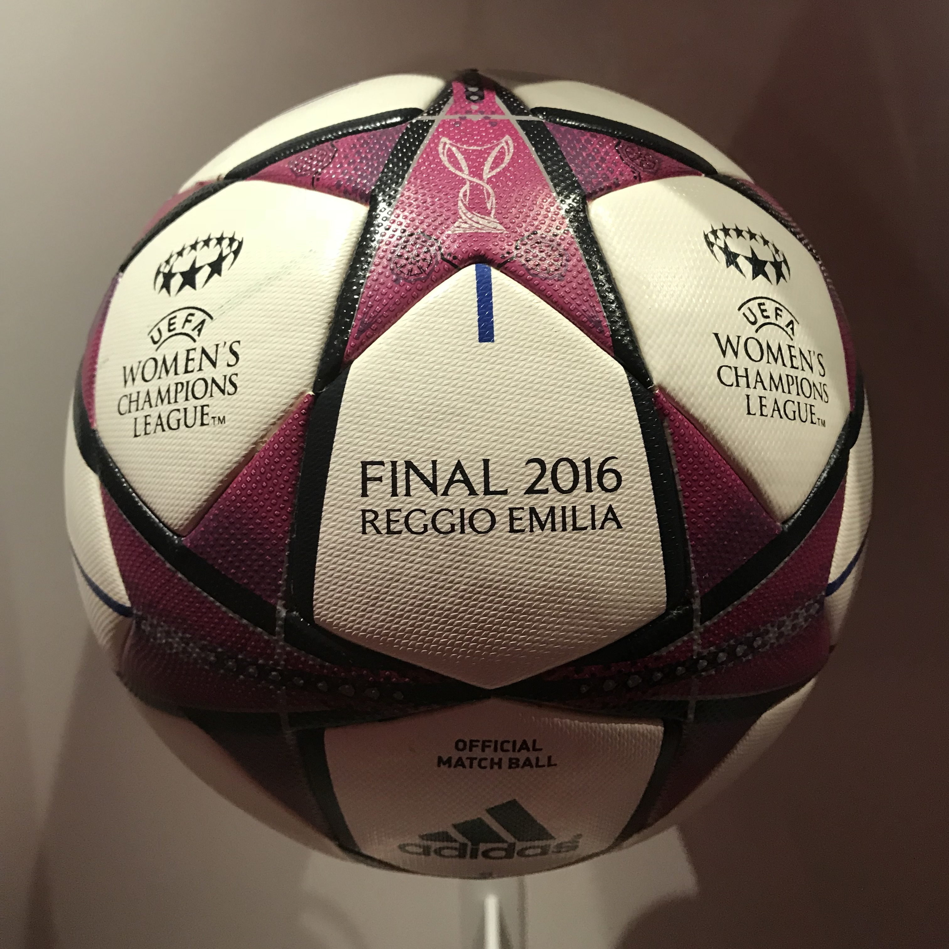 OL Le Musée au Parc OL.